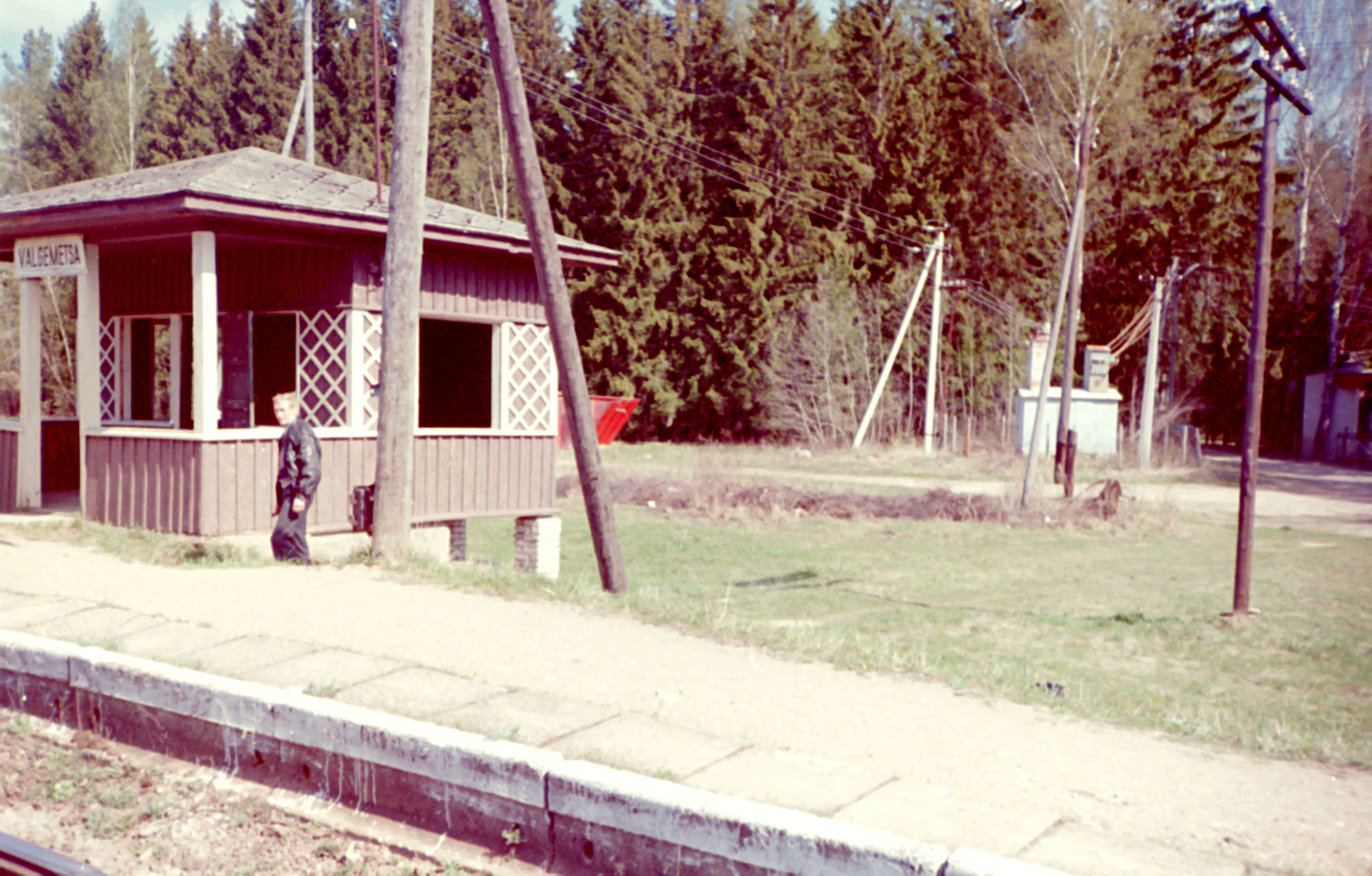 Valgemetsa raudteepeatuskoht